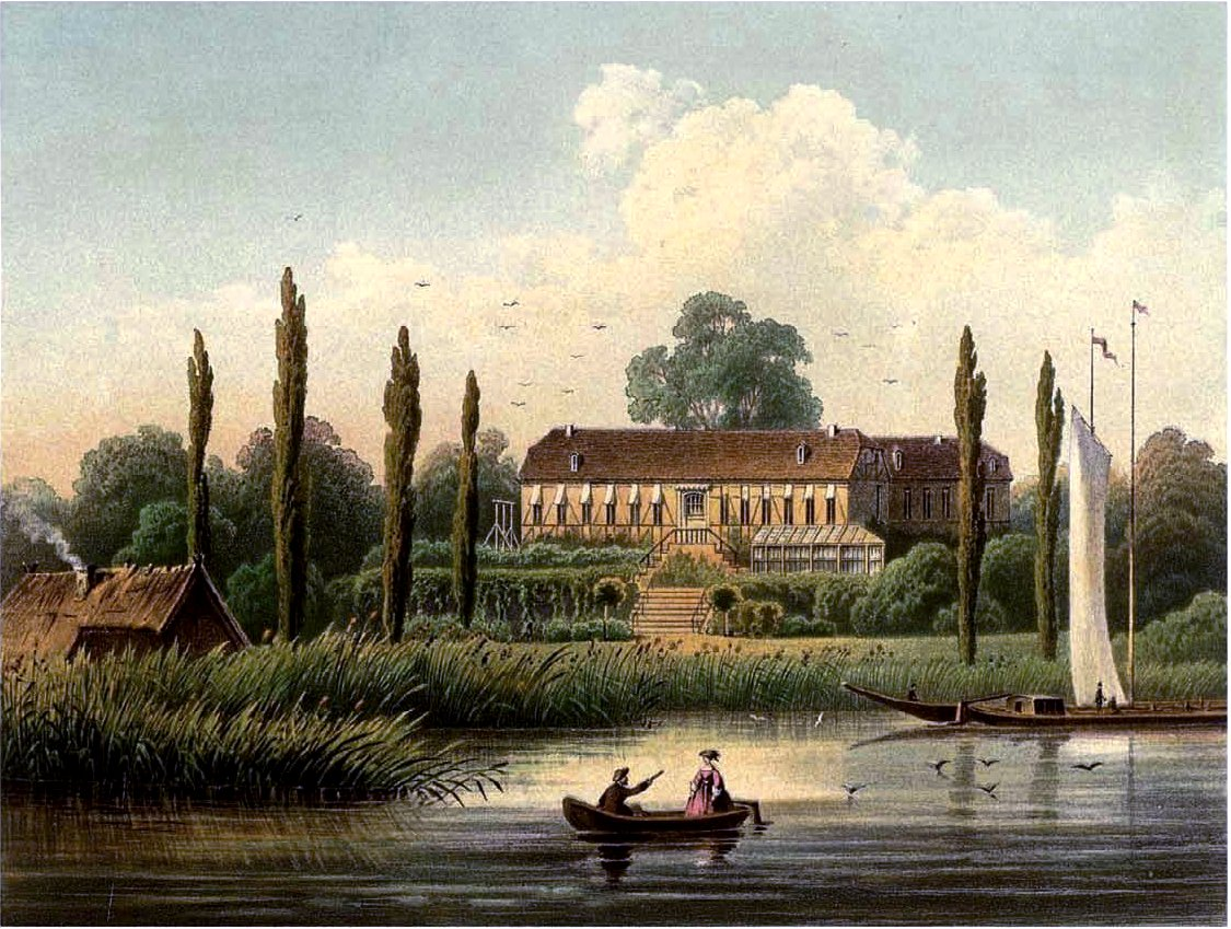 Lithographie des Rittergut Hohennauen